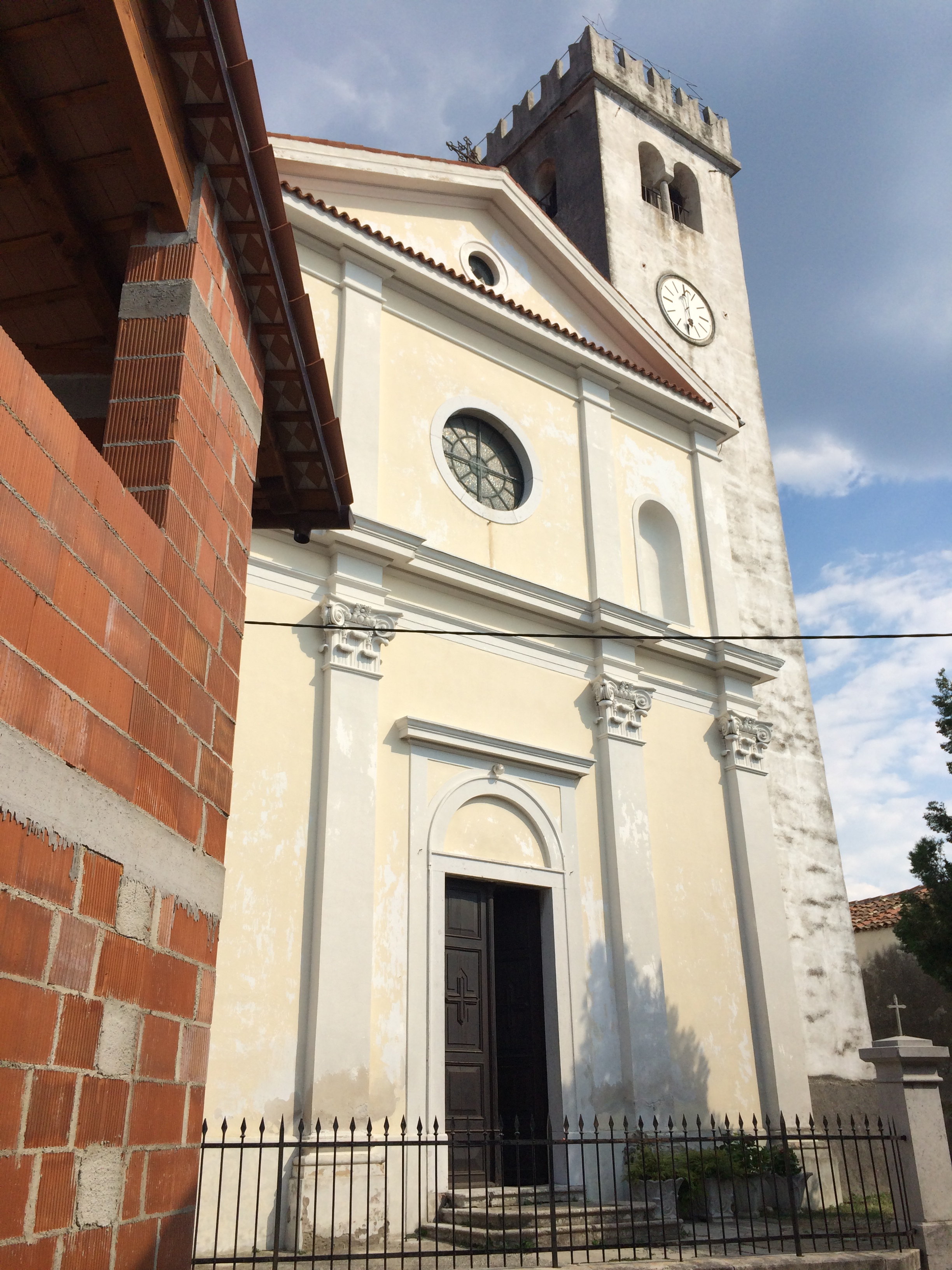 chiesa